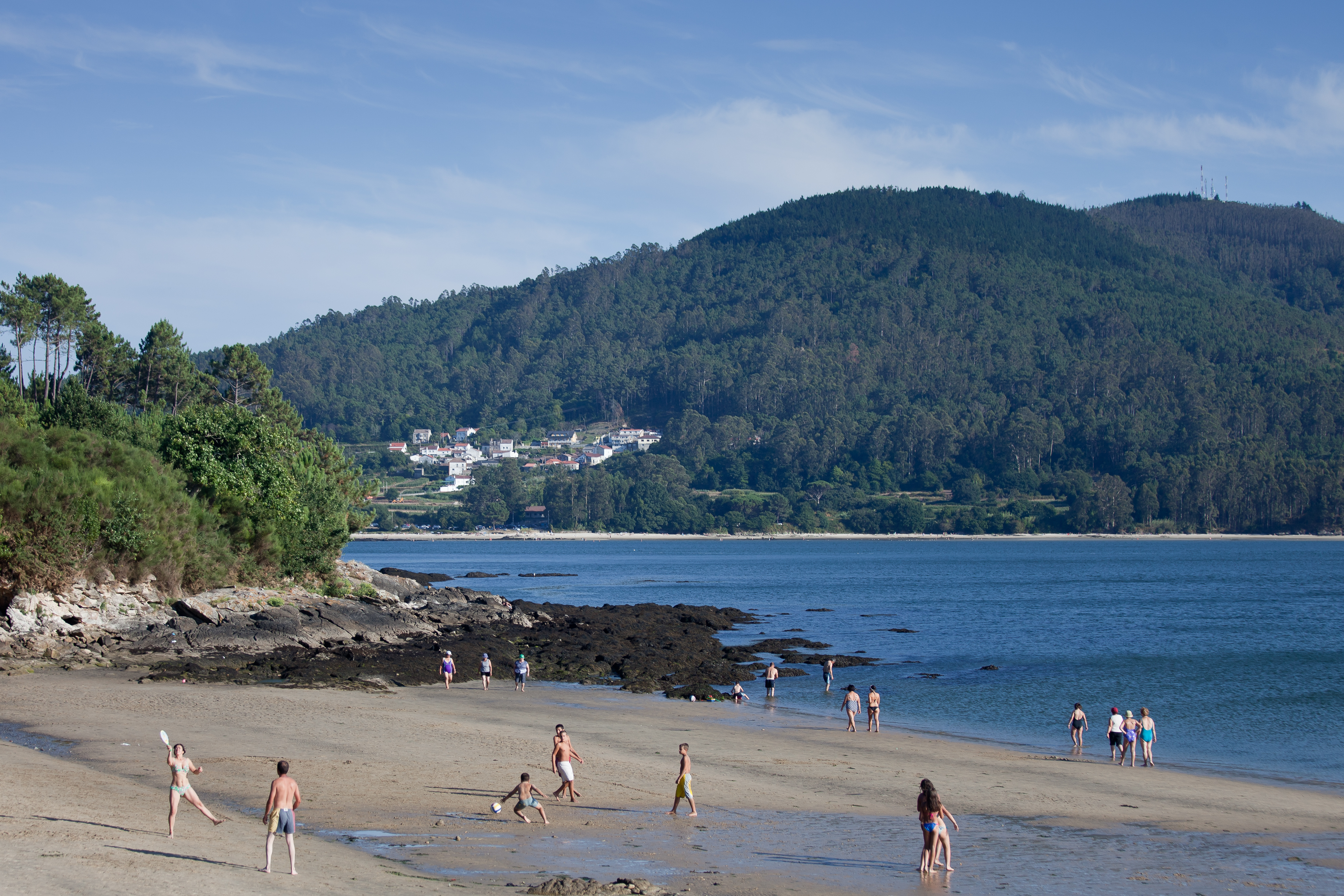 Praia de Brona, San Cosme de Outeiro, Outes, Galicia (Spain). Ó fondo a praia de Testal